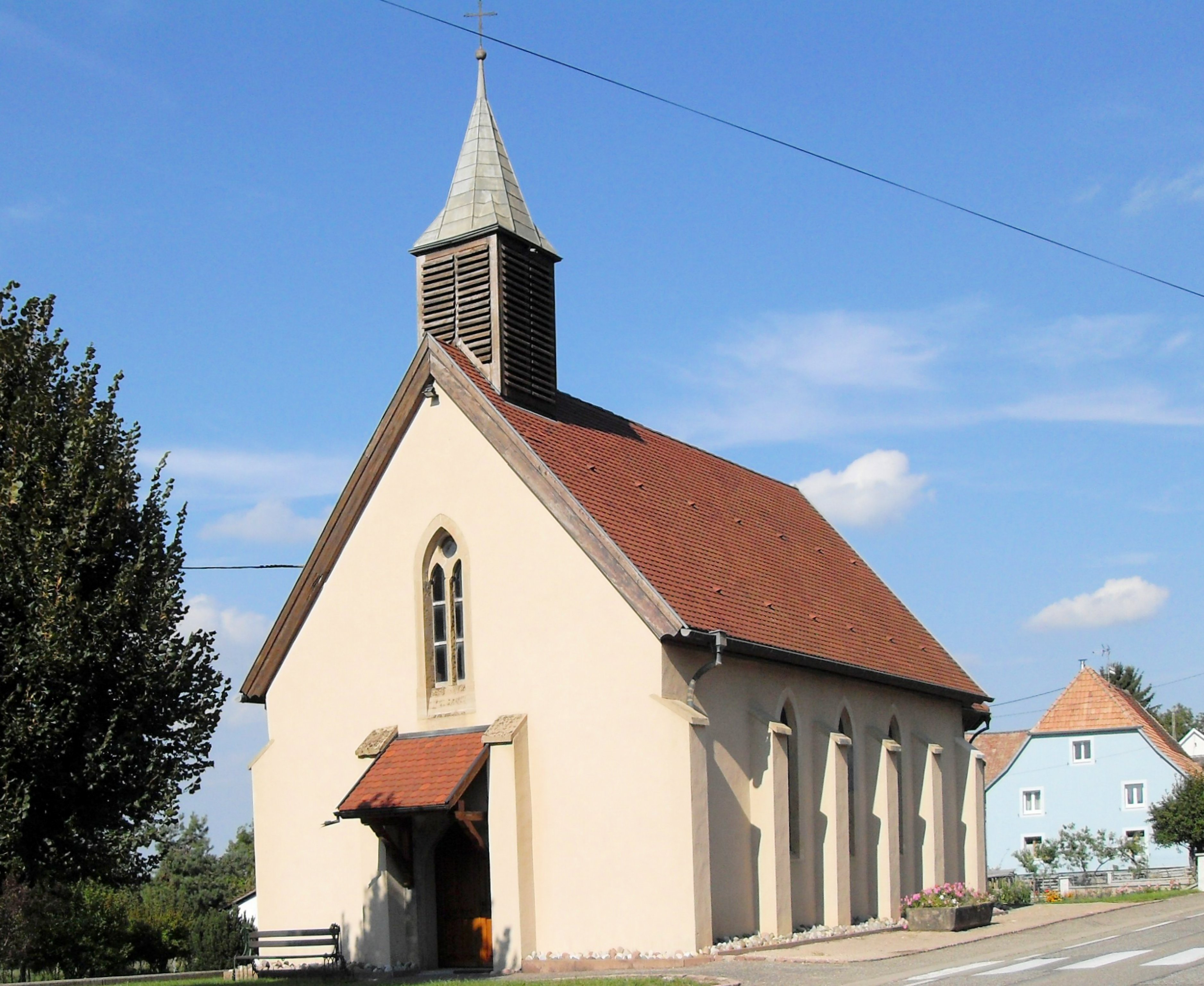 La chapelle Notre-Dame-des-Douleurs à Kœstlach